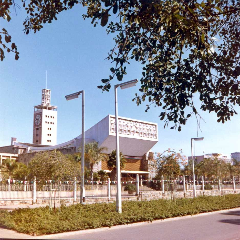 Kenyan parliament in Nairobi